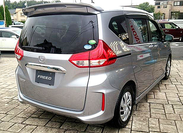 ホンダ・フリード G・ホンダセンシング